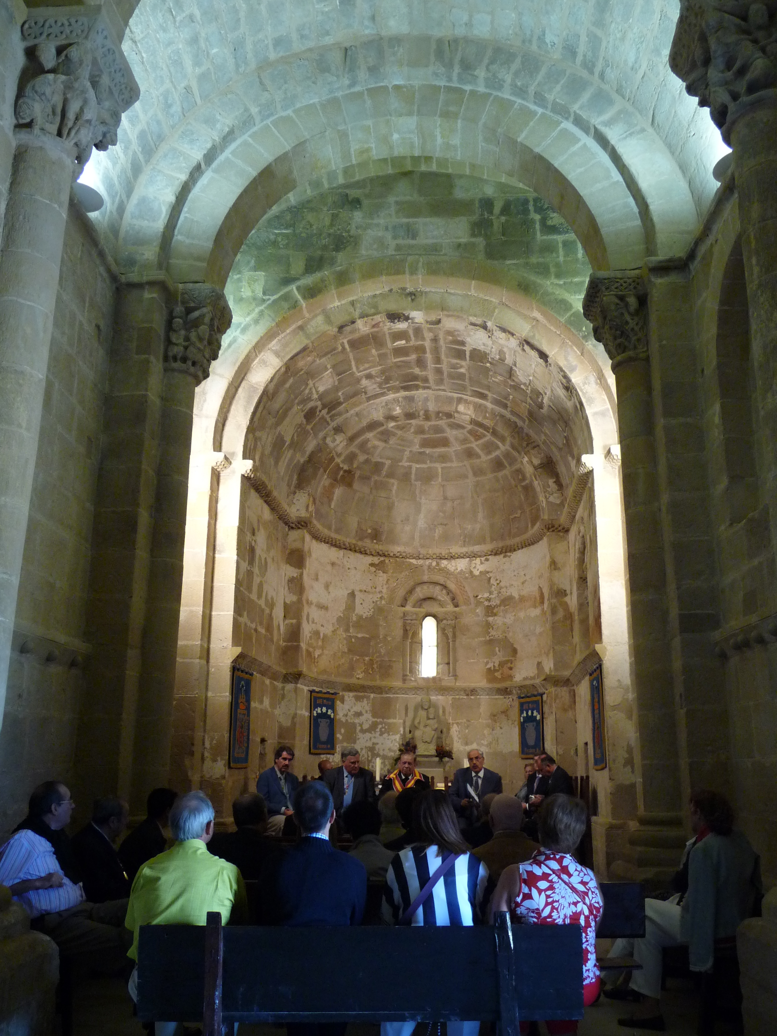 Reunión de diviseros, previa a la misa, en la ermita de Santa María de la Piscina